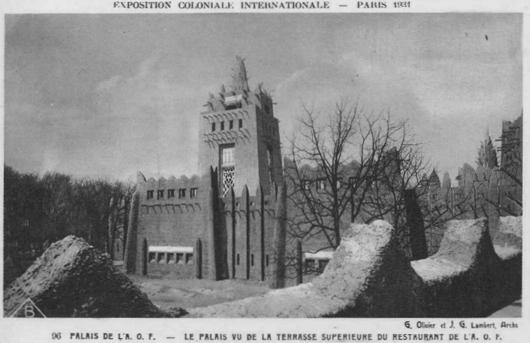 Pavillon de l'Afrique Occidentale Française à l'Exposition Coloniale de Paris en 1931